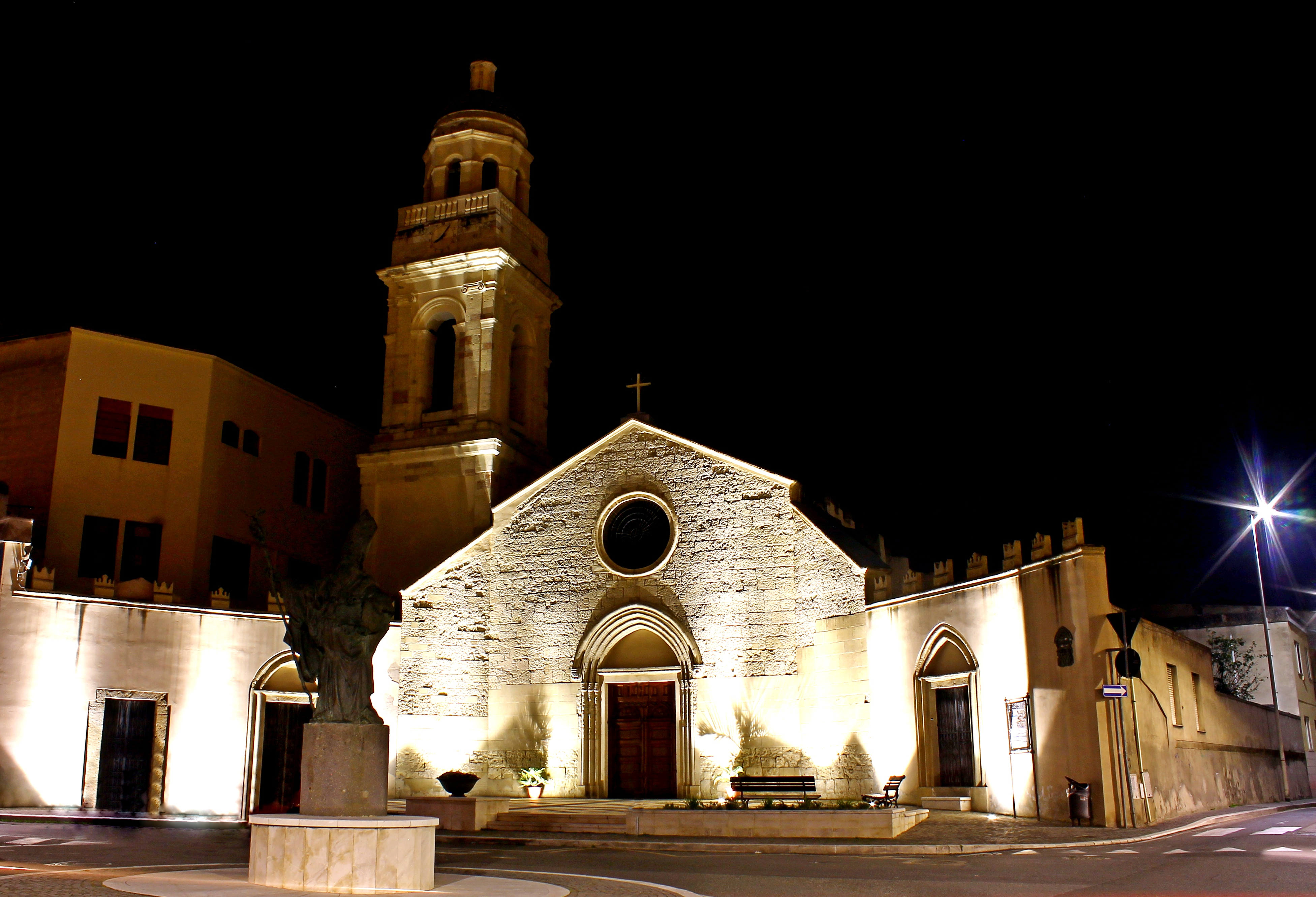 Chiesa Sant Ambrogio, Monserrato CA